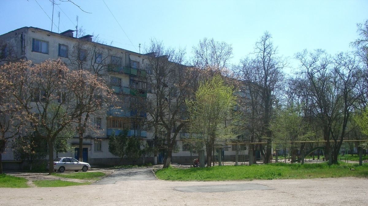 Улица посёлка